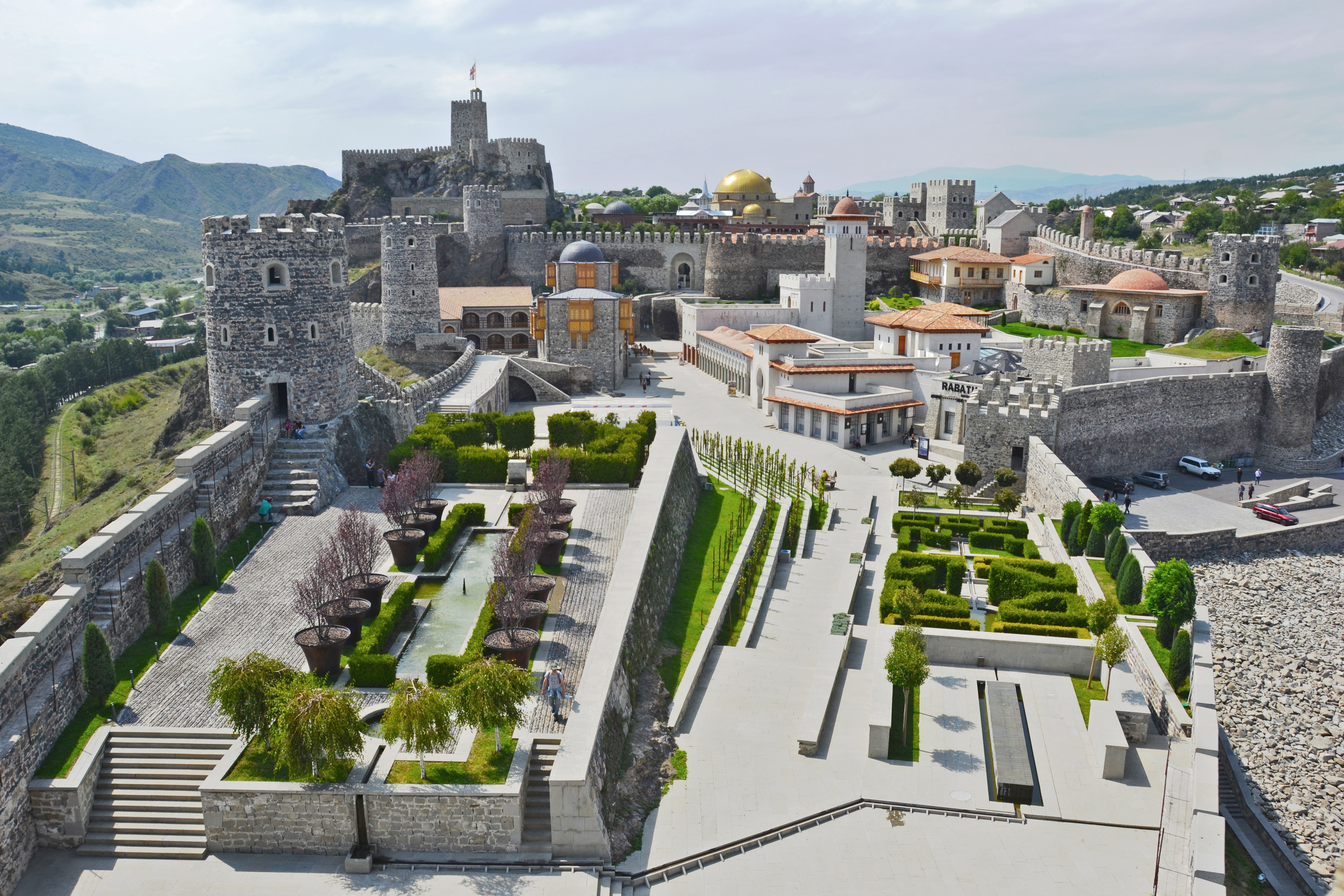 აბანო